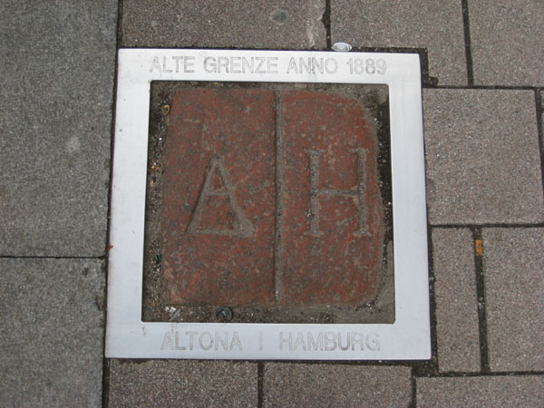 Grenzmarkierung Altona-Hamburg